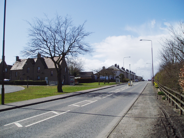 Breich, West Lothian